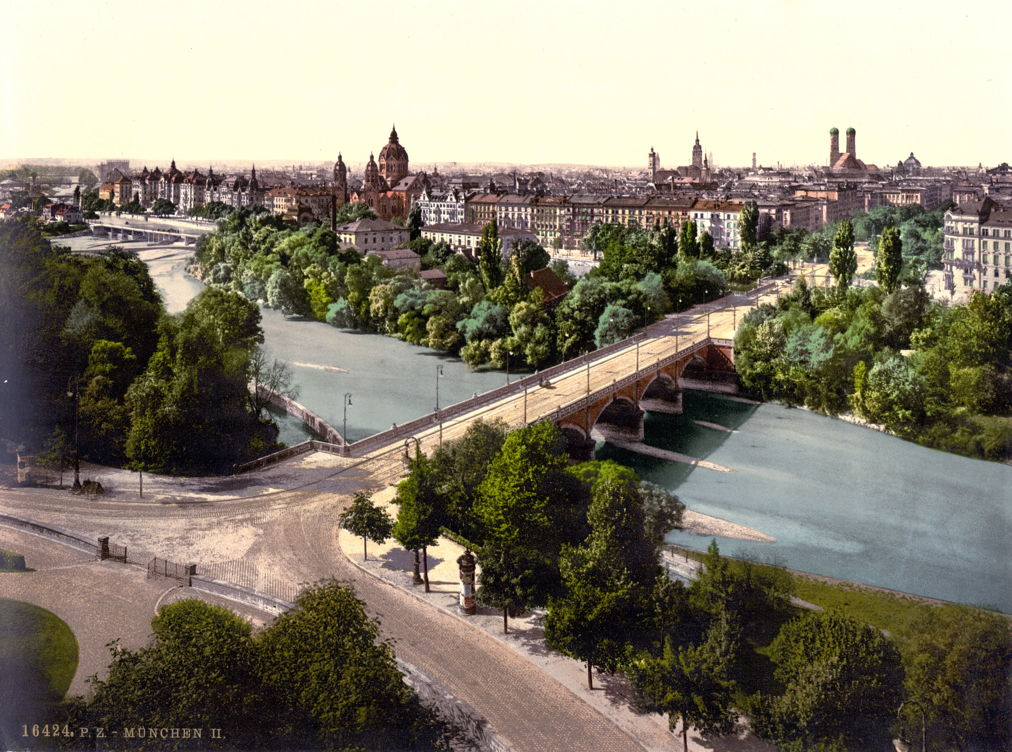 Stadtansicht von München vom Maximilianeum aus gesehen, Postkarte Ende 19. Jahrhundert.